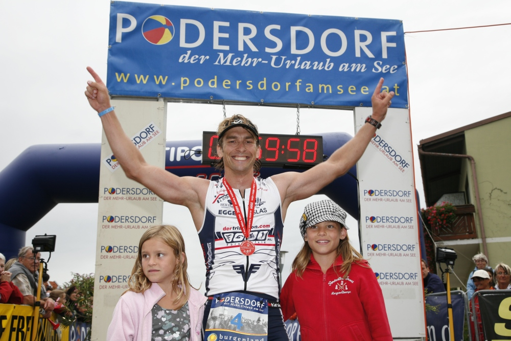 Andreas Fuchs - Bei seinem Sieg der österreichischen Staatsmeisterschaften der Langdistanz in Podersdorf